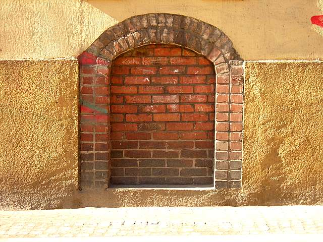 Część piwnicznej szyi wystaje ponad poziom nawierzchni.